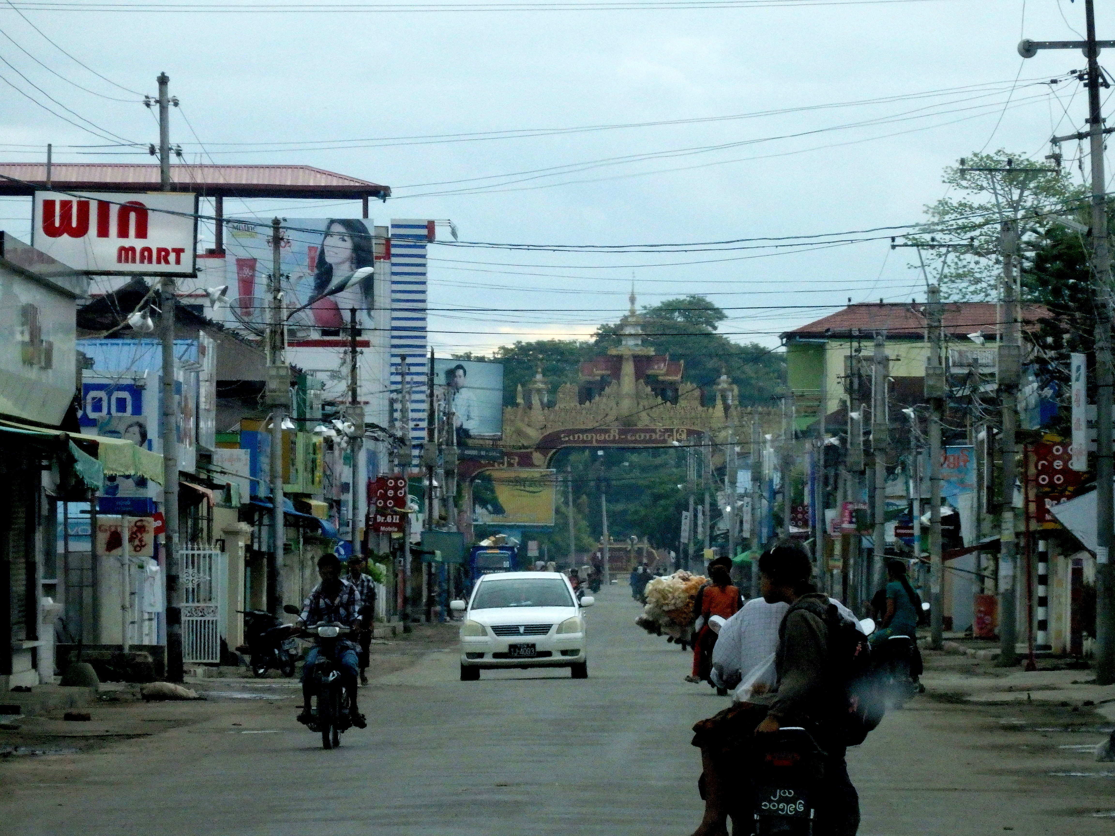 Taungoo, Myanmar (Burma)